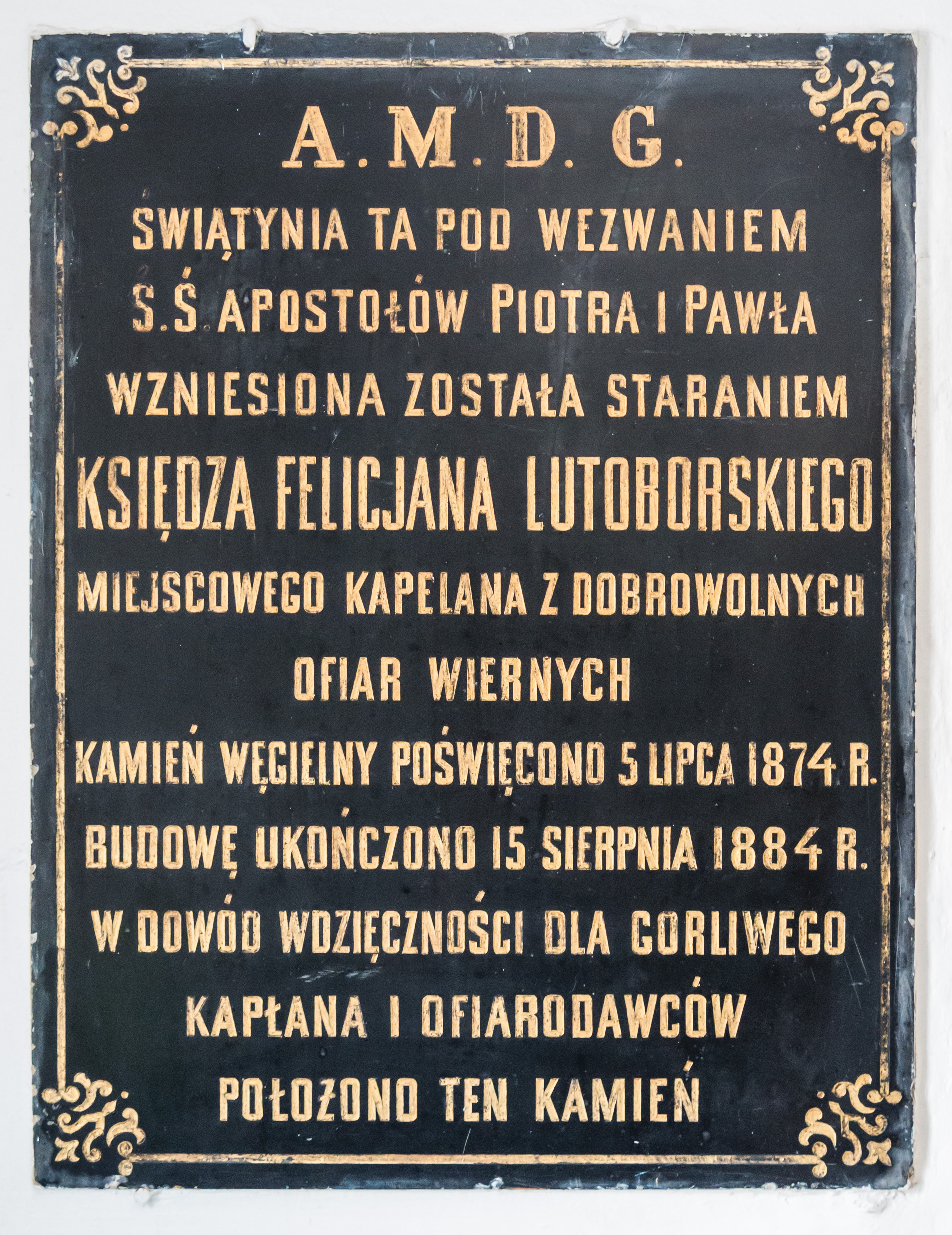 Tablica pamiątkowa poświęcona budowie kościoła św. św. Piotra i Pawła.